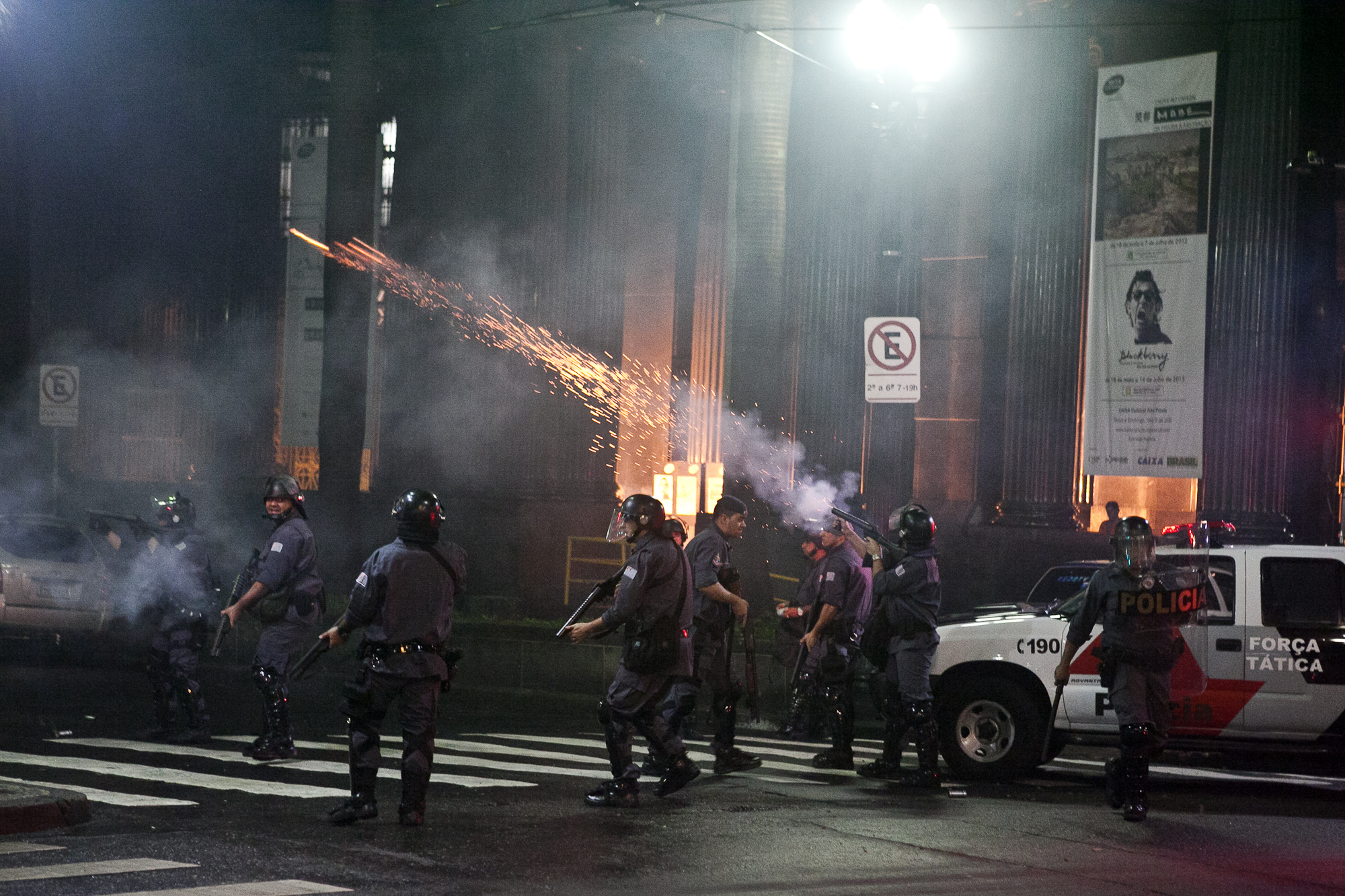 Protesto por redução das passagens de ônibus, em São Paulo, SP